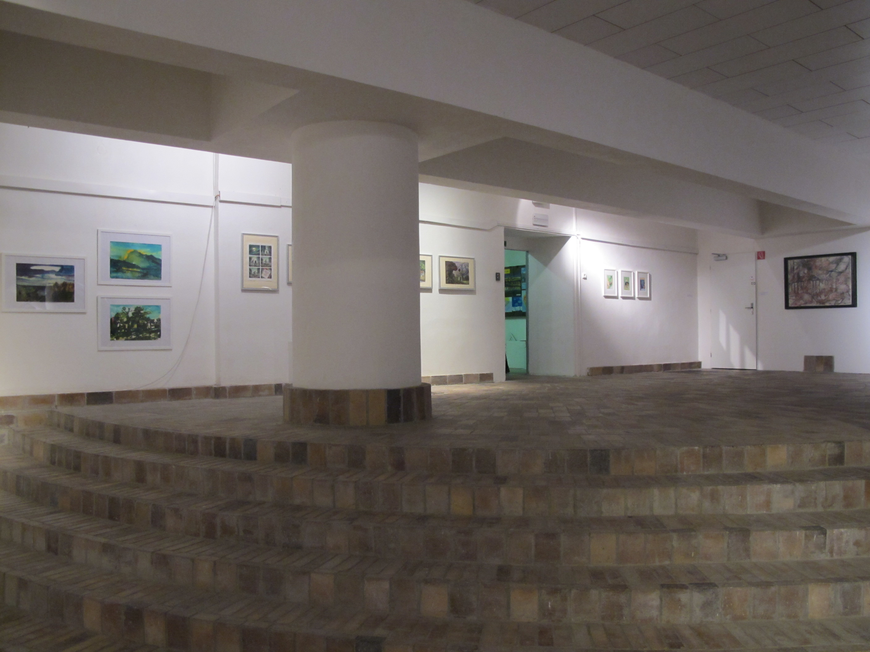 Galerie výtvarného umění v Mostě: vernisáž k výstavě obrazů, soch a grafik saských umělců.